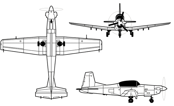 3 vues du PC-7